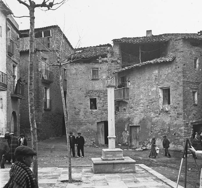 Creu i plaça. Joan Roig i Font (1913)